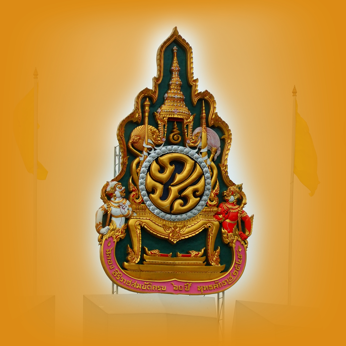 Silom, Bang Rak, Bangkok, Thailand